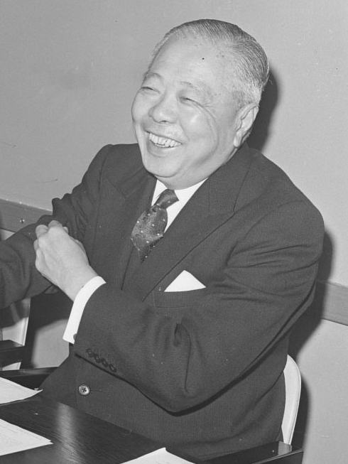 Handelsdelegatie uit Hong Kong in Den Haag . Mrs. S. Yuen , mr. W. C. G. Knowles en Sir Sik Nin Cha (leider)